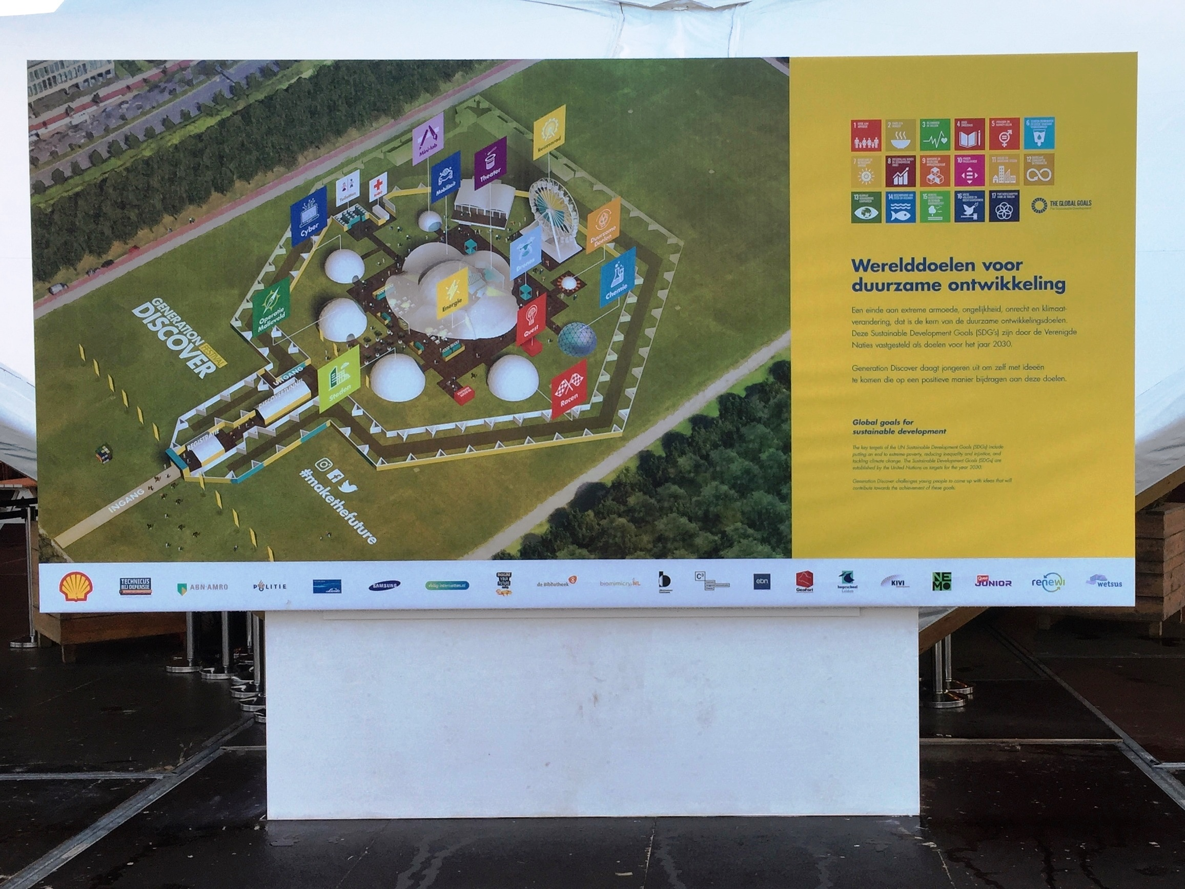 Generation Discover 2018 op het Malieveld in Den Haag